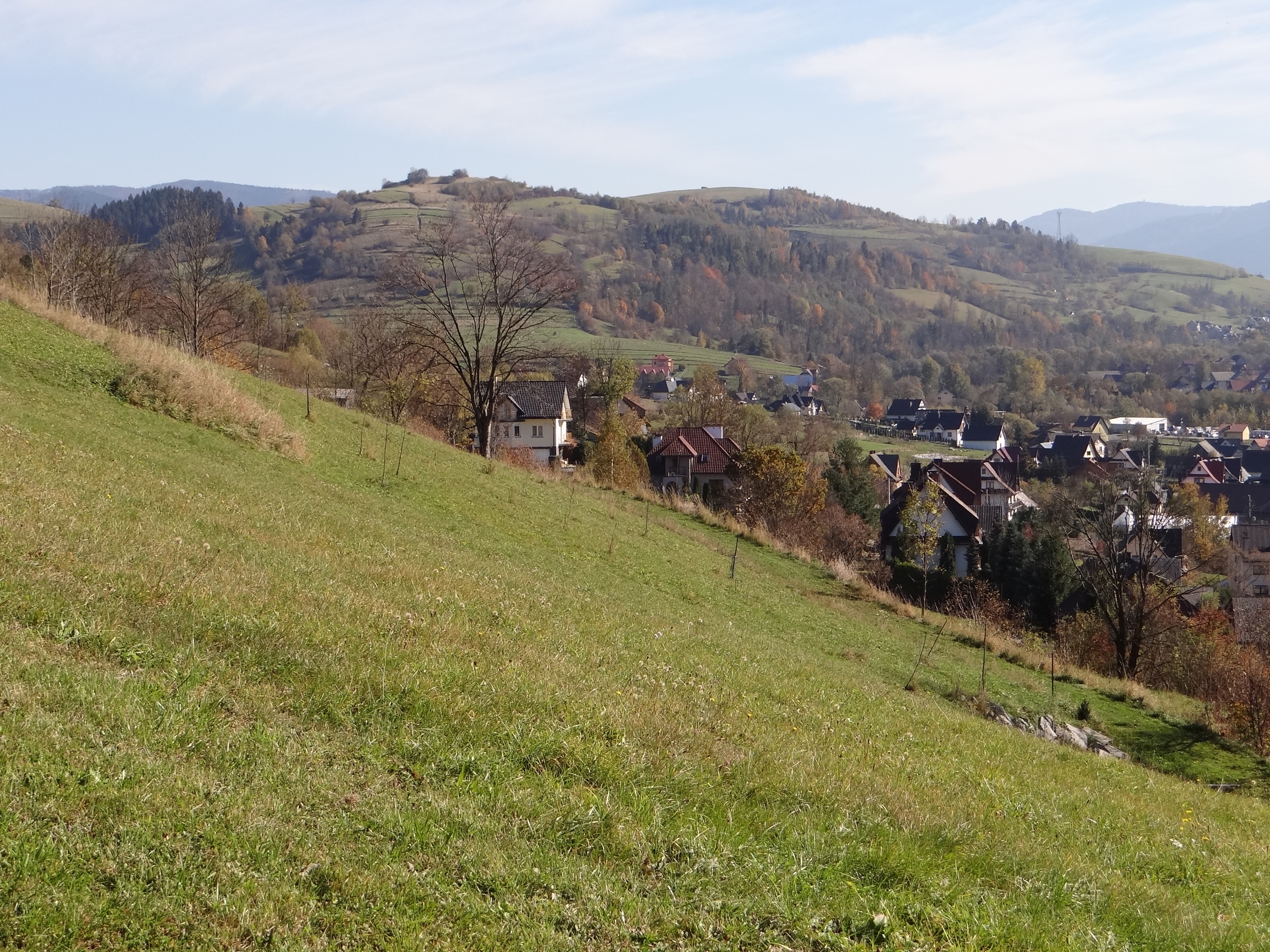 Widok na Kocią Górkę z Wsołowej